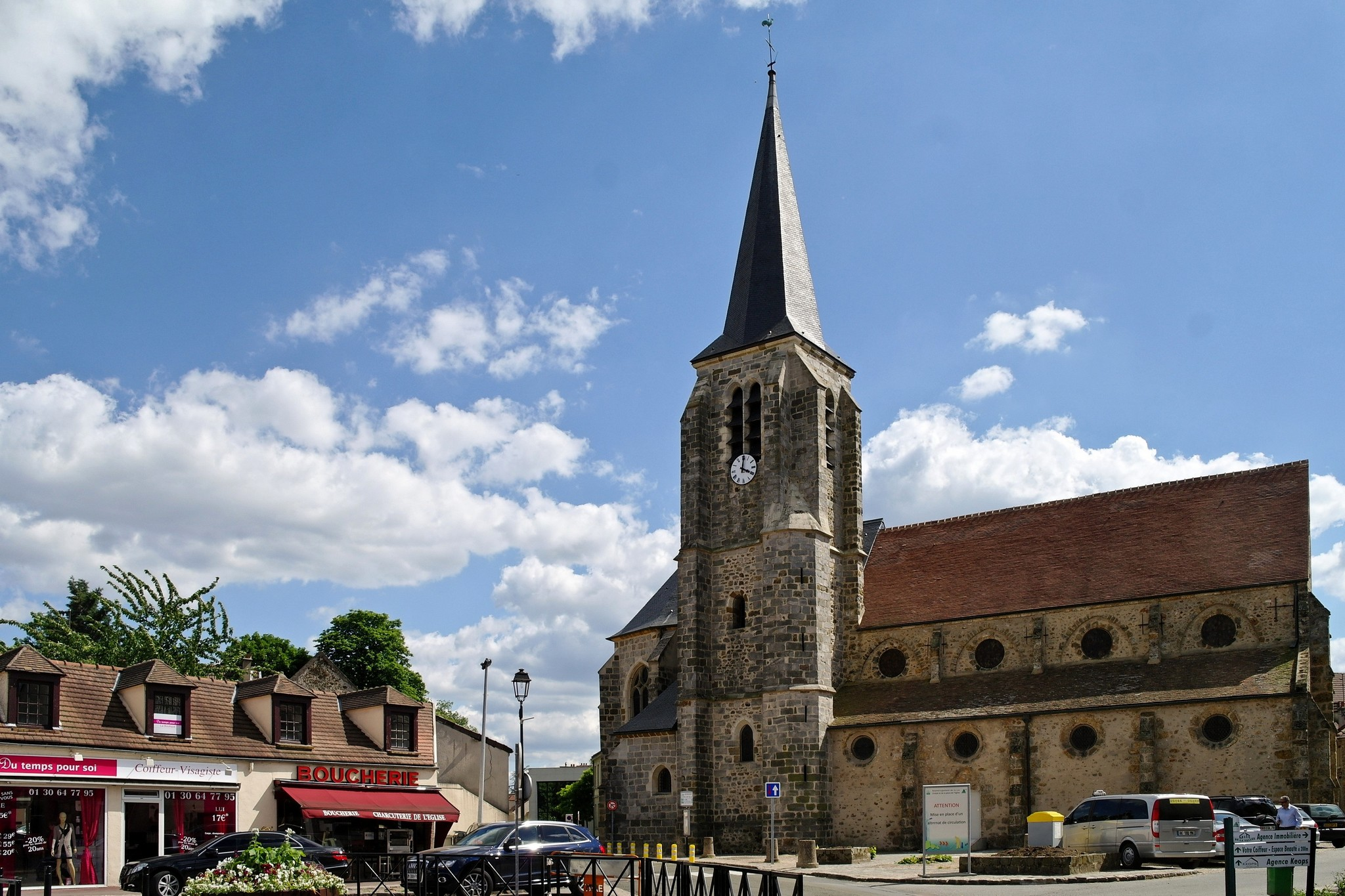 Guyancourt (78), un aspect de la banlieue parisienne